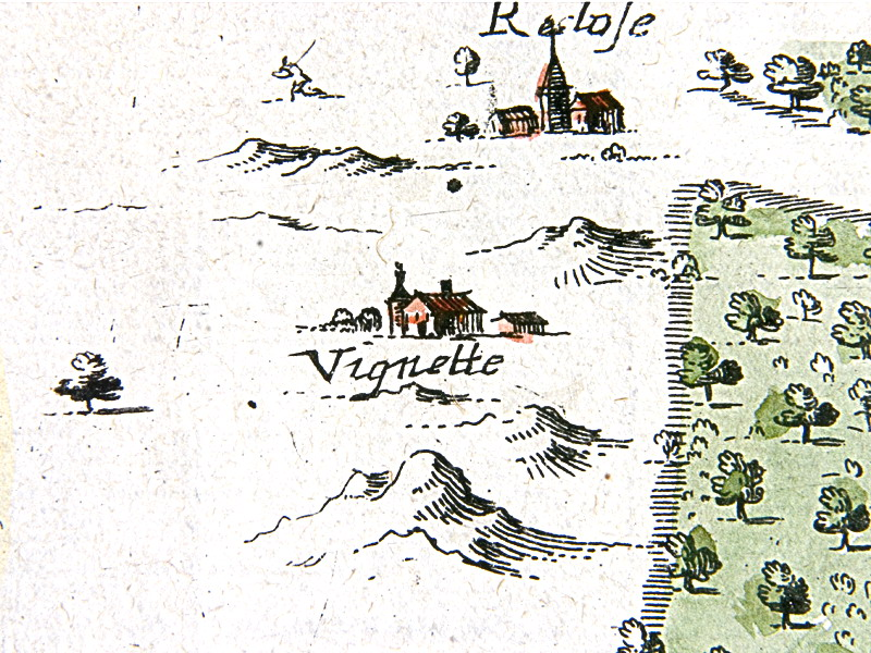 Partie d'une carte de la forêt montrant l'ancien hameau de la Vignette (Recloses, Seine-et-Marne, région Île-de-France).